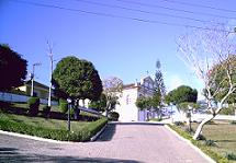 Pça Barão da Conceição em Sto Antº do Aventureiro-MG